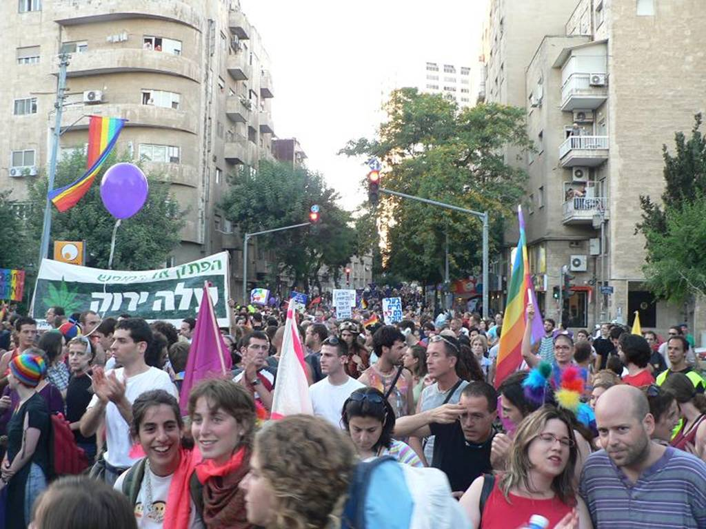 Jerusalem Pride Parade 2005